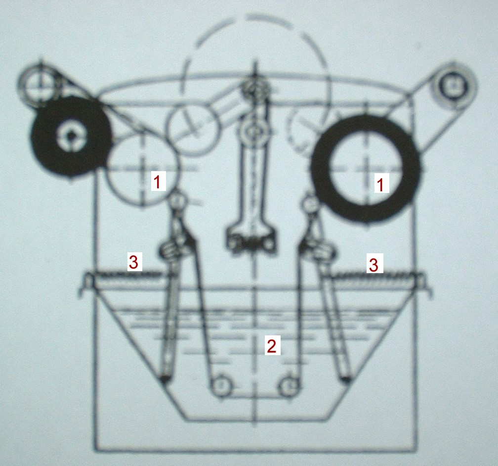 Schema: Färbejigger